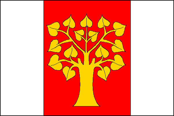 vlajka, Rakov, okres Přerov